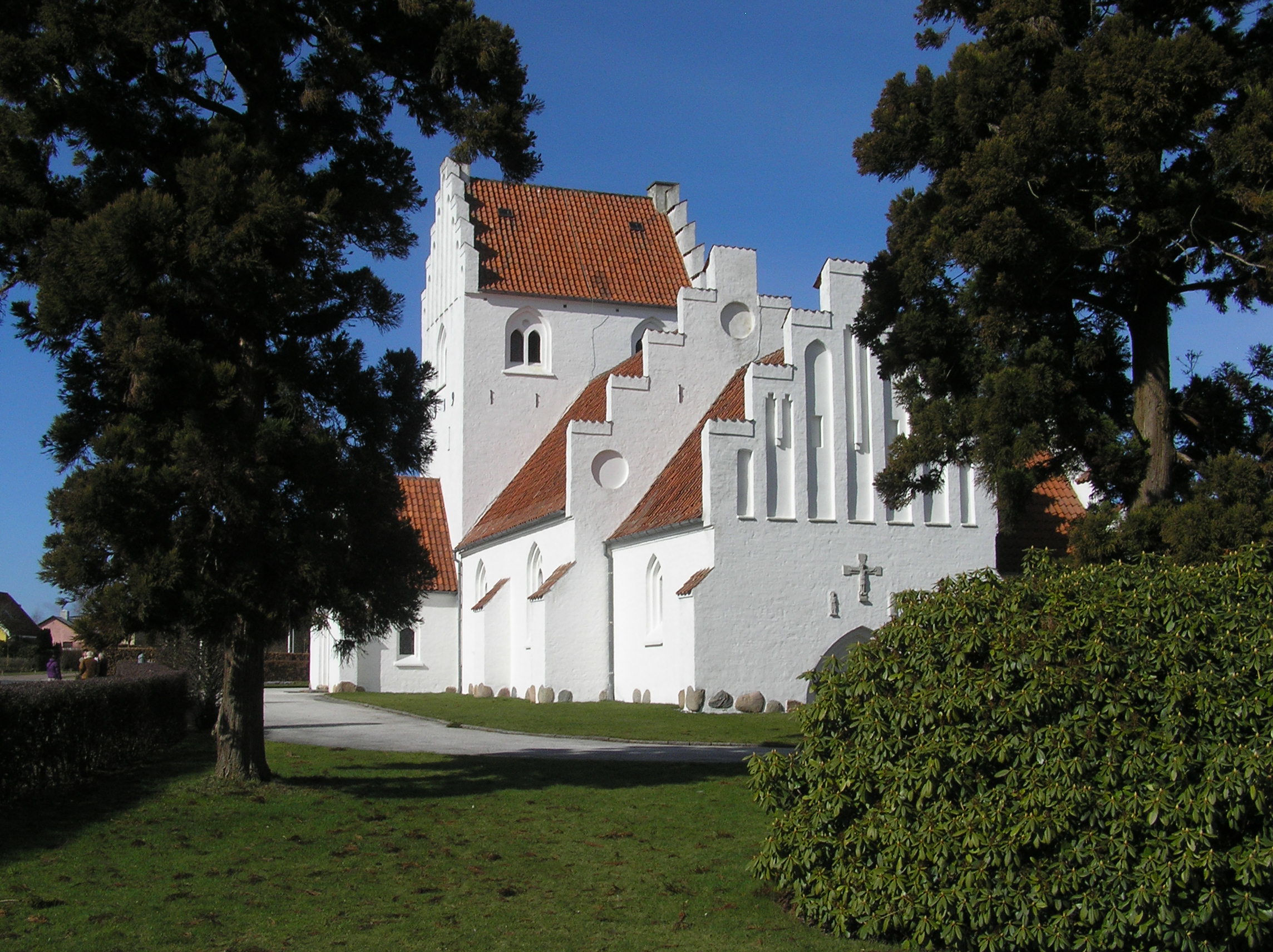 Lundtofte Kirke fra øst - sydøst